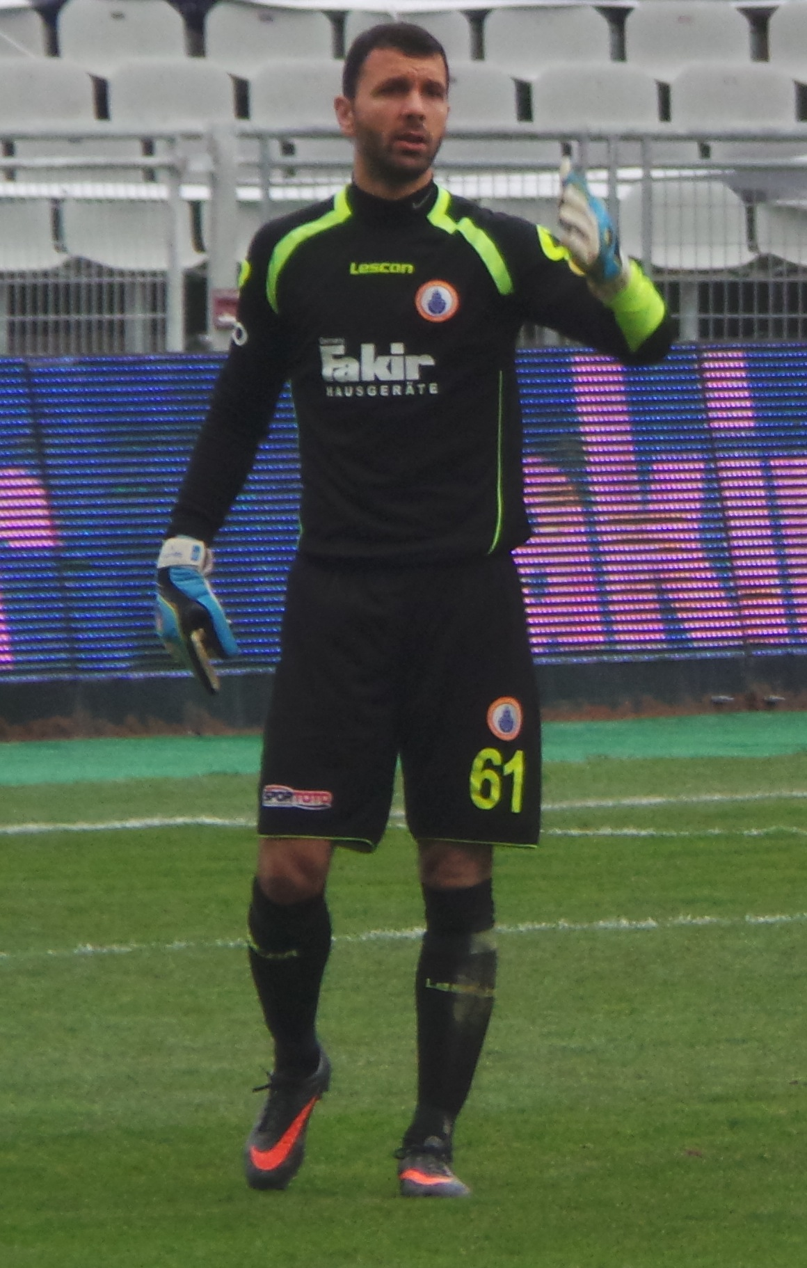 Oğuzhan Bahadır